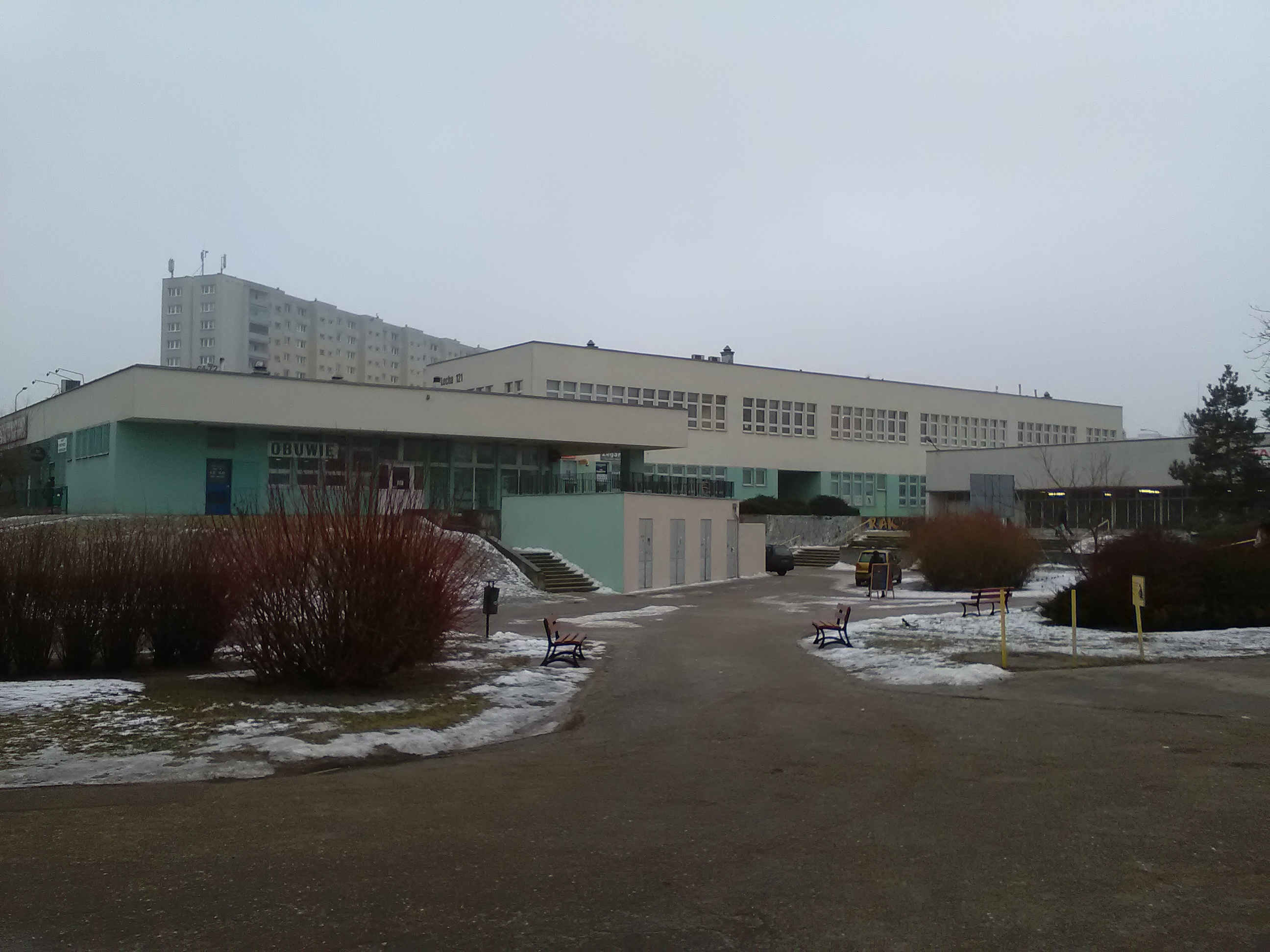 Polska. Osiedle Lecha 121 w Poznaniu pawilon handlowo usługowy.